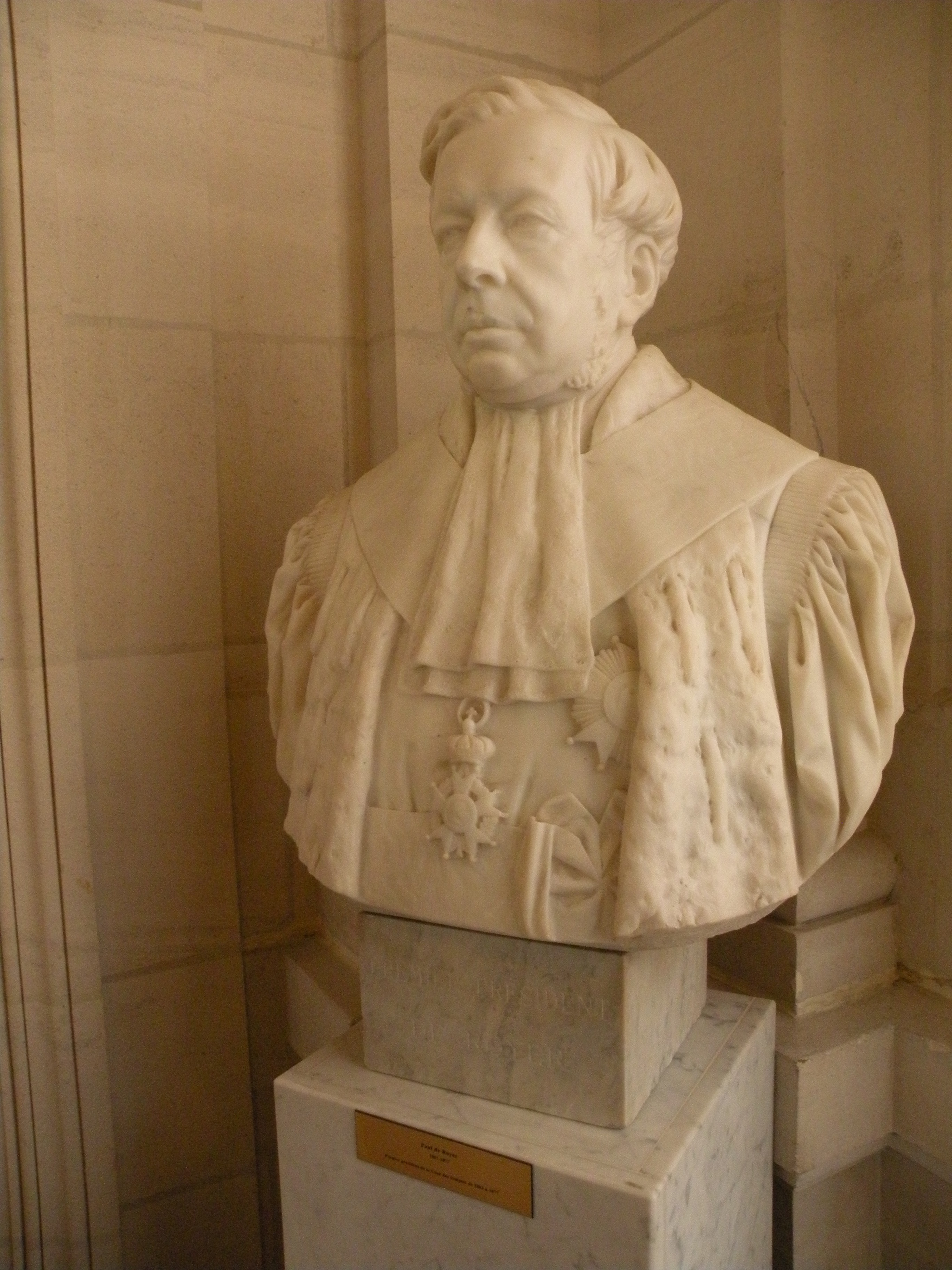 Cour des Comptes : Buste d'Ernest de Royer